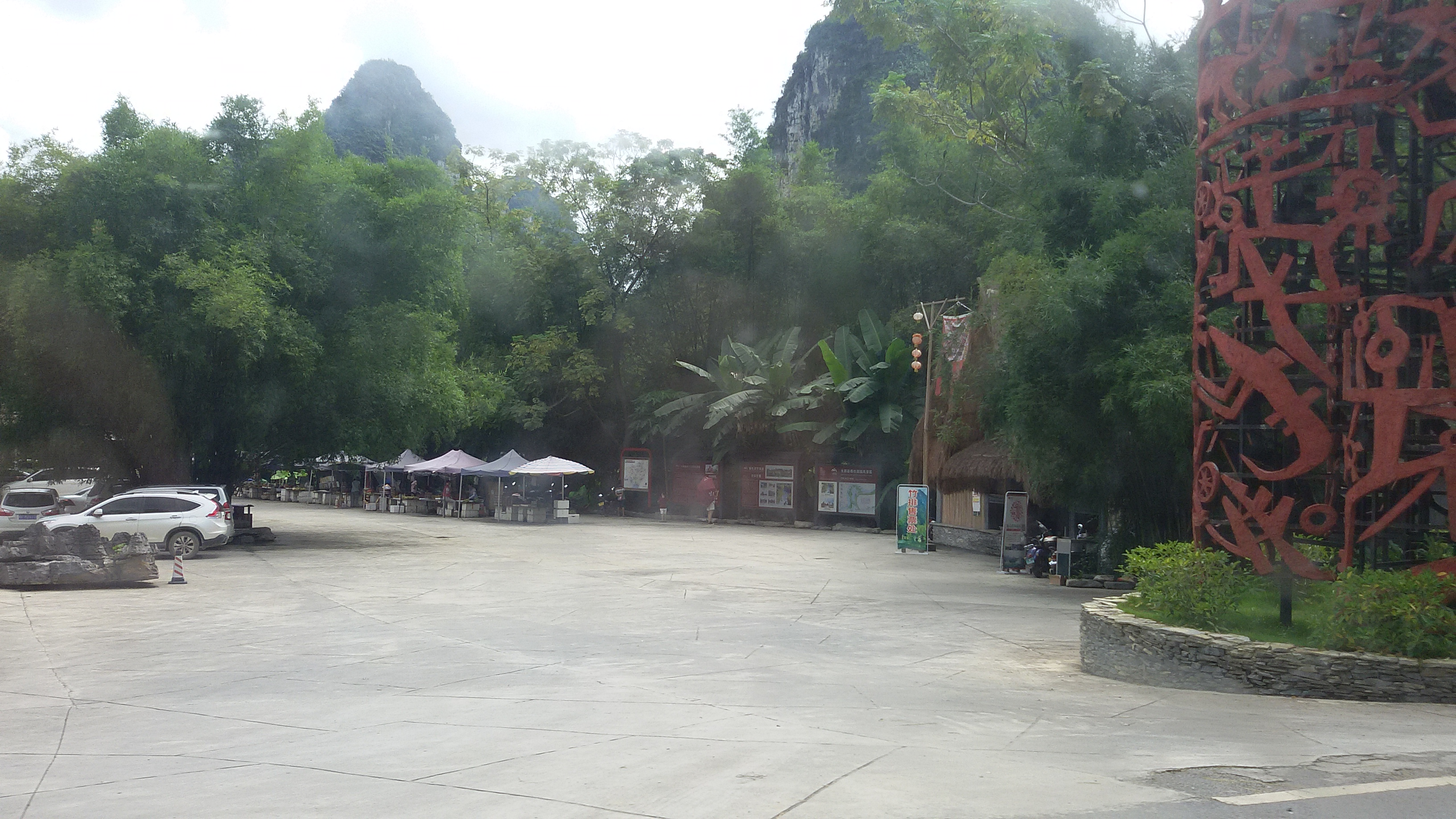 粵語: 明仕田園二號門